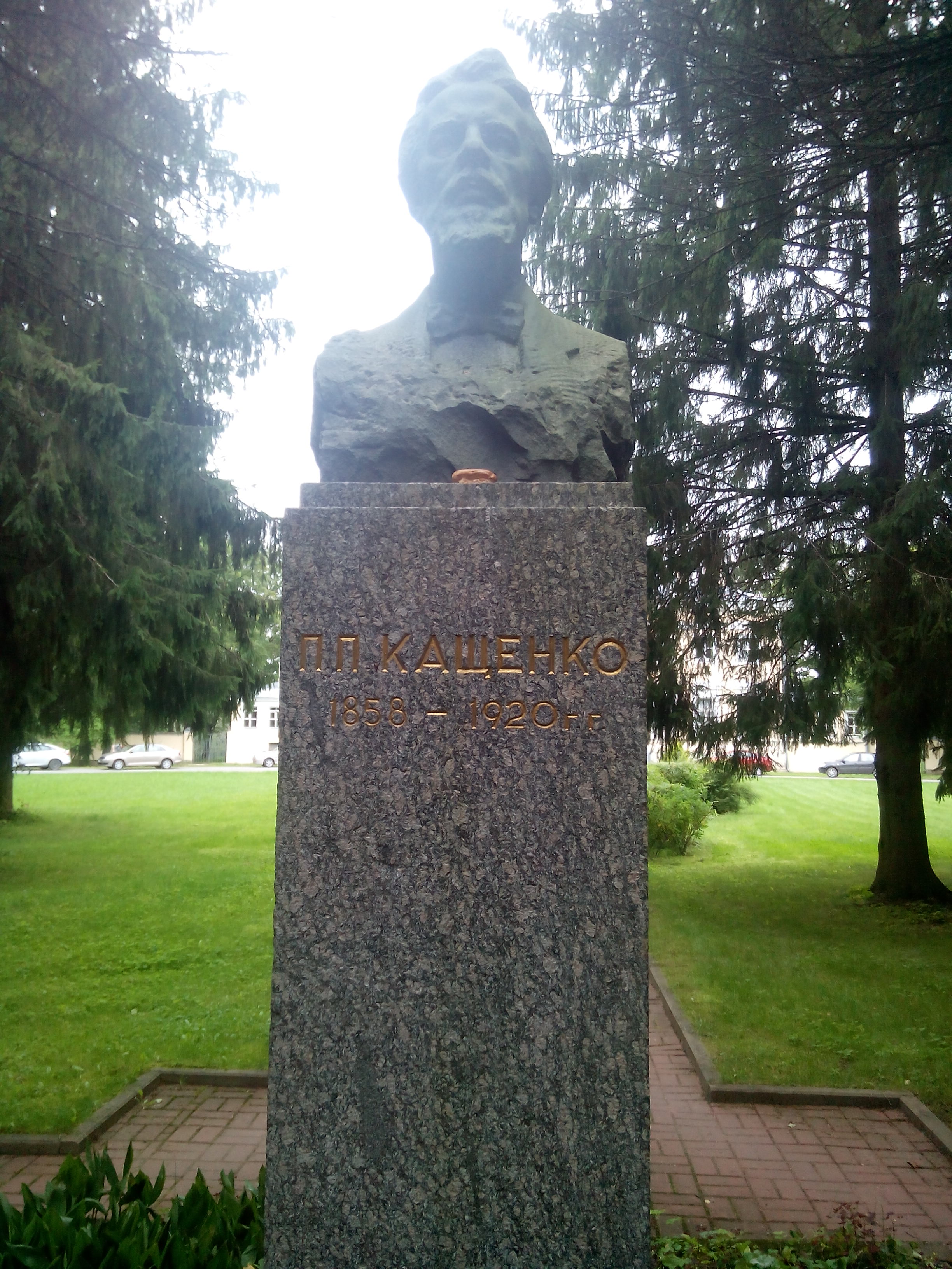 Бюст Кащенко в СПб ГБУЗ «Больница им. П. П. Кащенко»